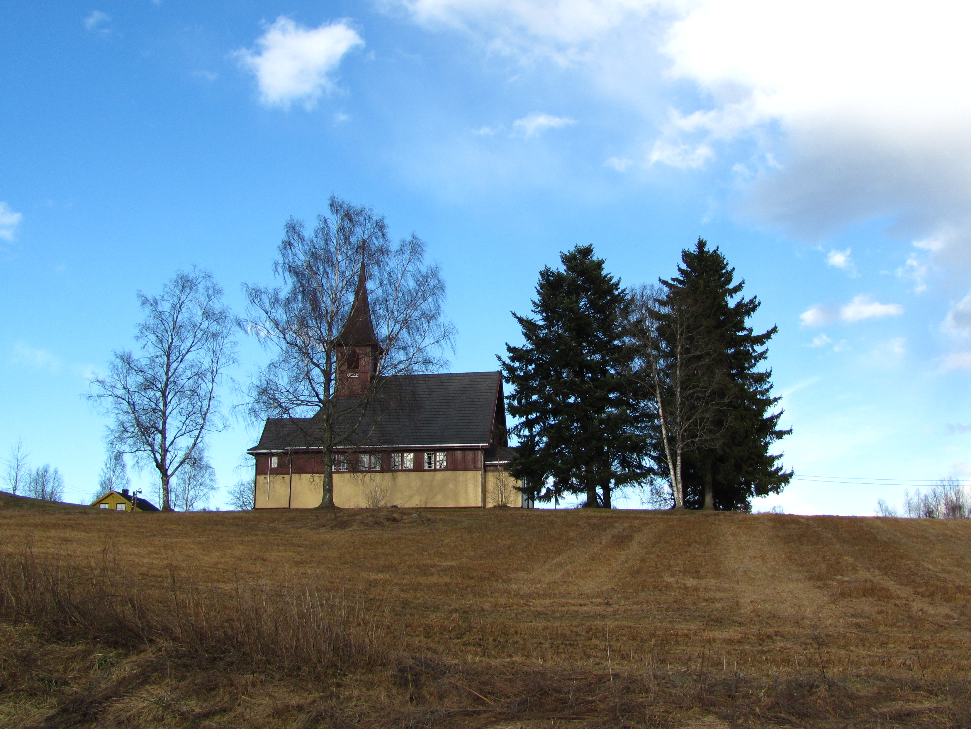 Dalen kirke i Fet kommune, Akershus, sett fra riksveien. Bildet er bevisst ikke croppet mer, kirken ligger på en høyde over Rv22 ved Gansvika, og det forsøkes vist her.